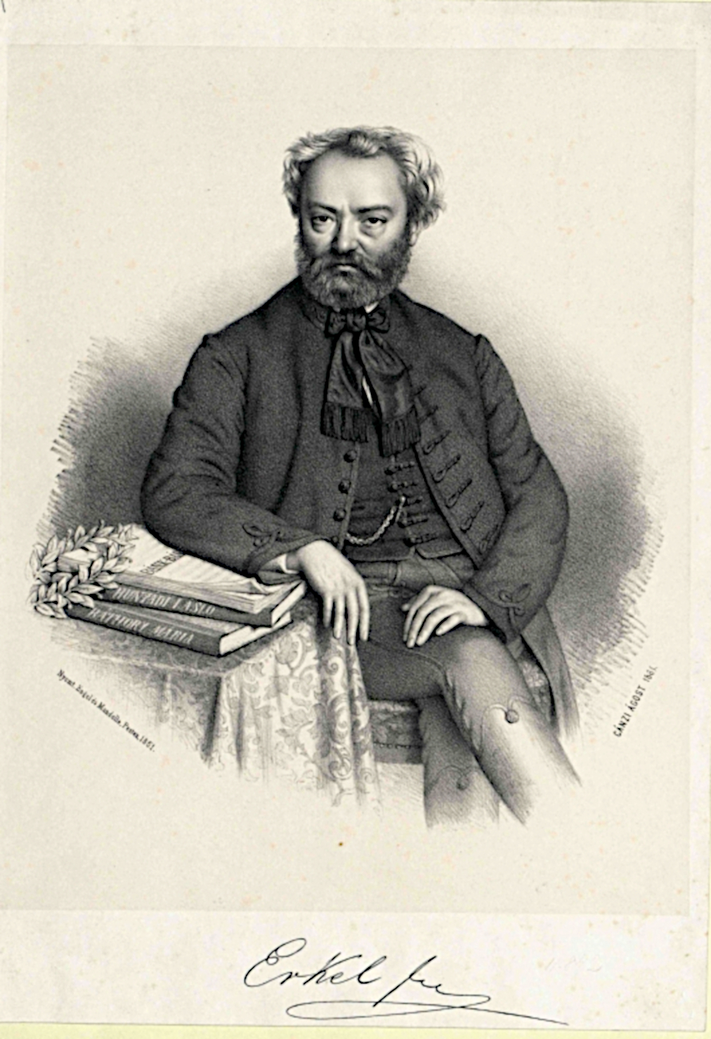 Erkel, Franz (1810 - 1893) Komponist, Künstler, Musik, Porträt, Tonkünstler Porträtsammlung